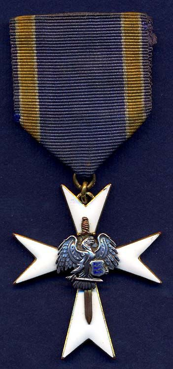 Kaitseliidu Valgeristi 3. klass.